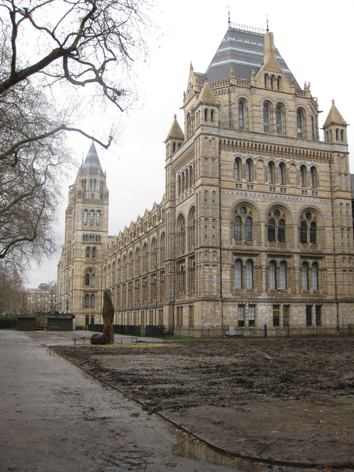 Natural History Museum Exterior חזית המוזיאון להיסטוריה של הטבע, לונדון